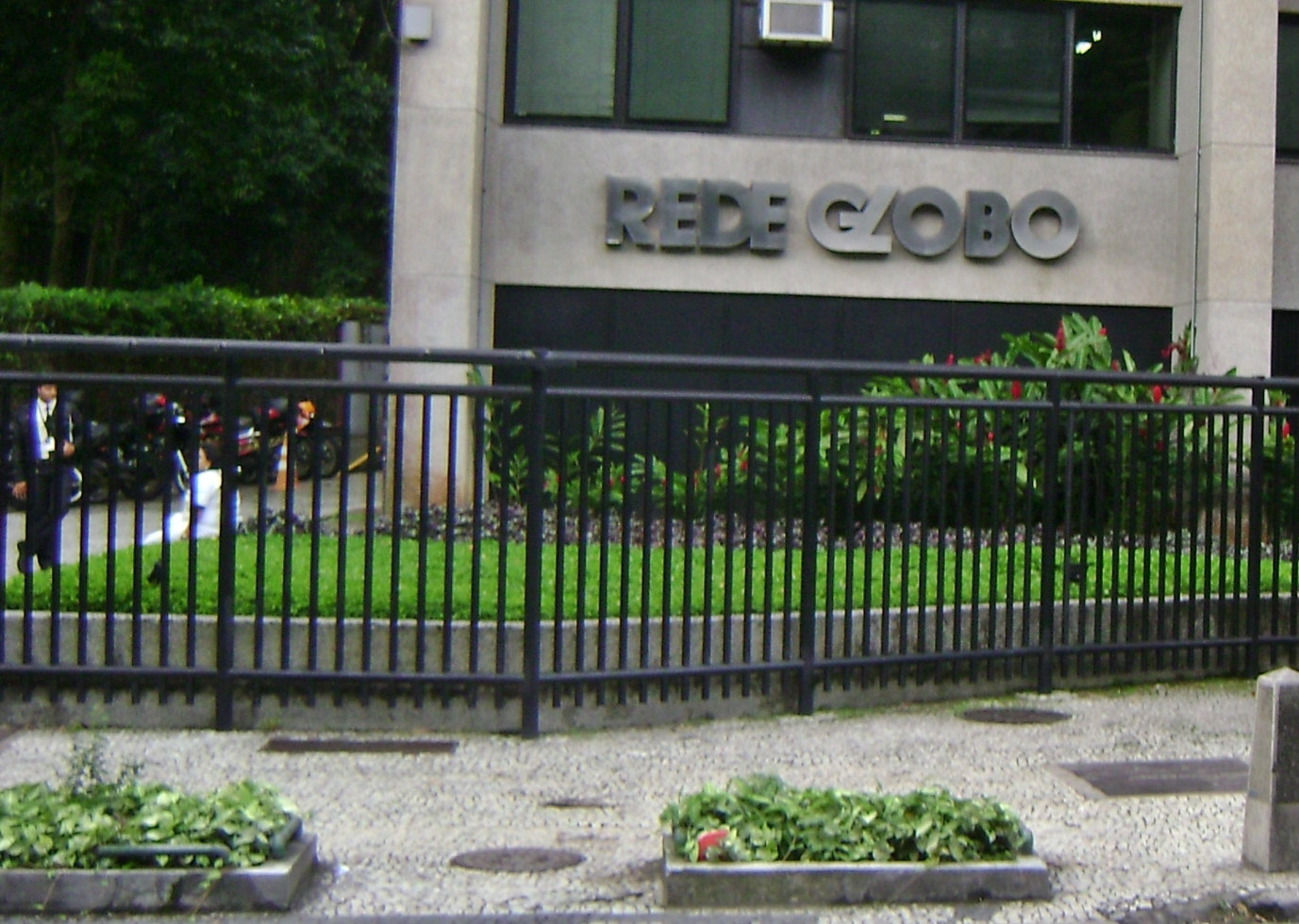 Prédio da Rede Globo, na cidade do Rio de Janeiro, Brasil.